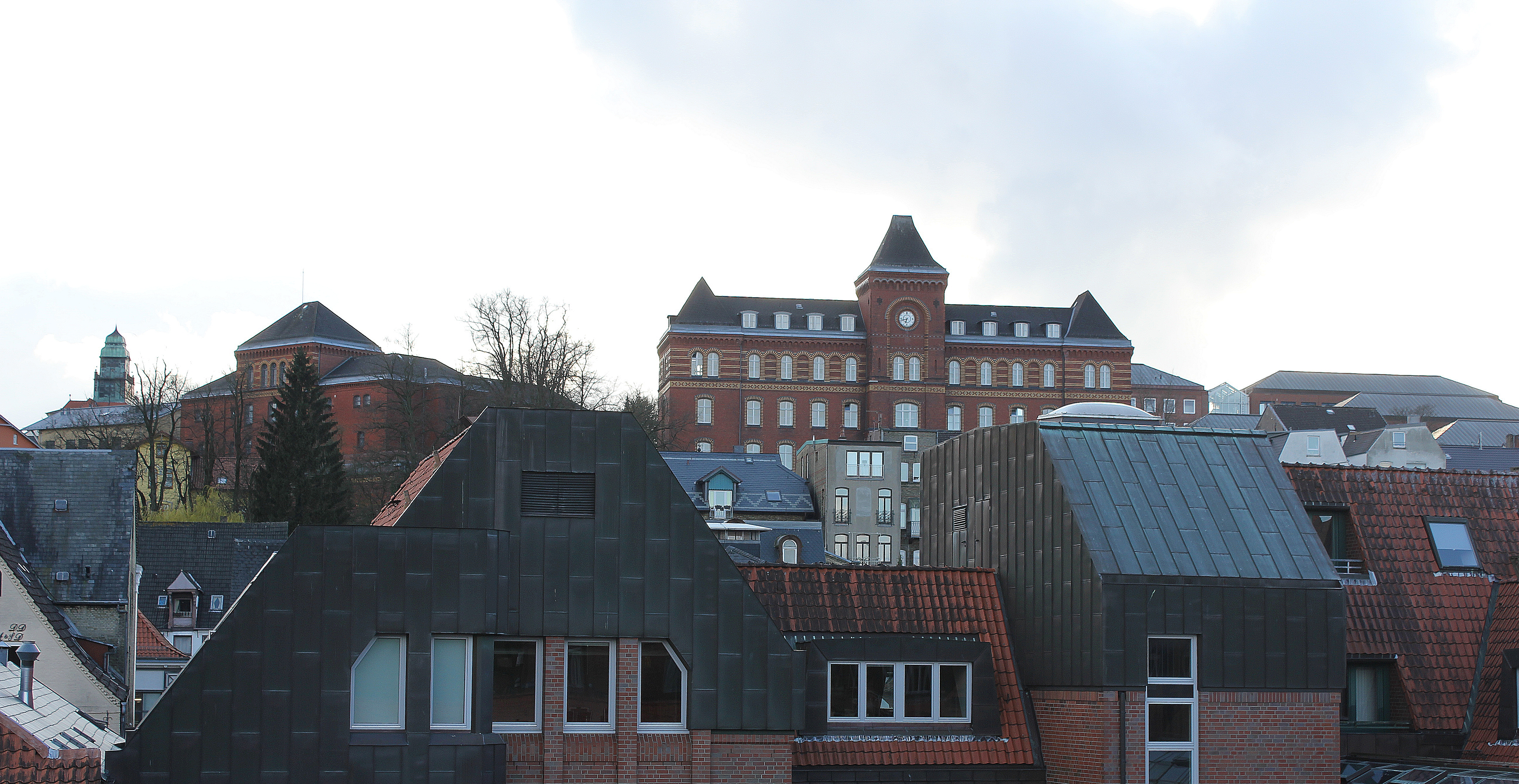 Landgericht Flensburg und Justizvollzugsanstalt Flensburg (früher Landesgerichtsgefängnis) aus der Ferne